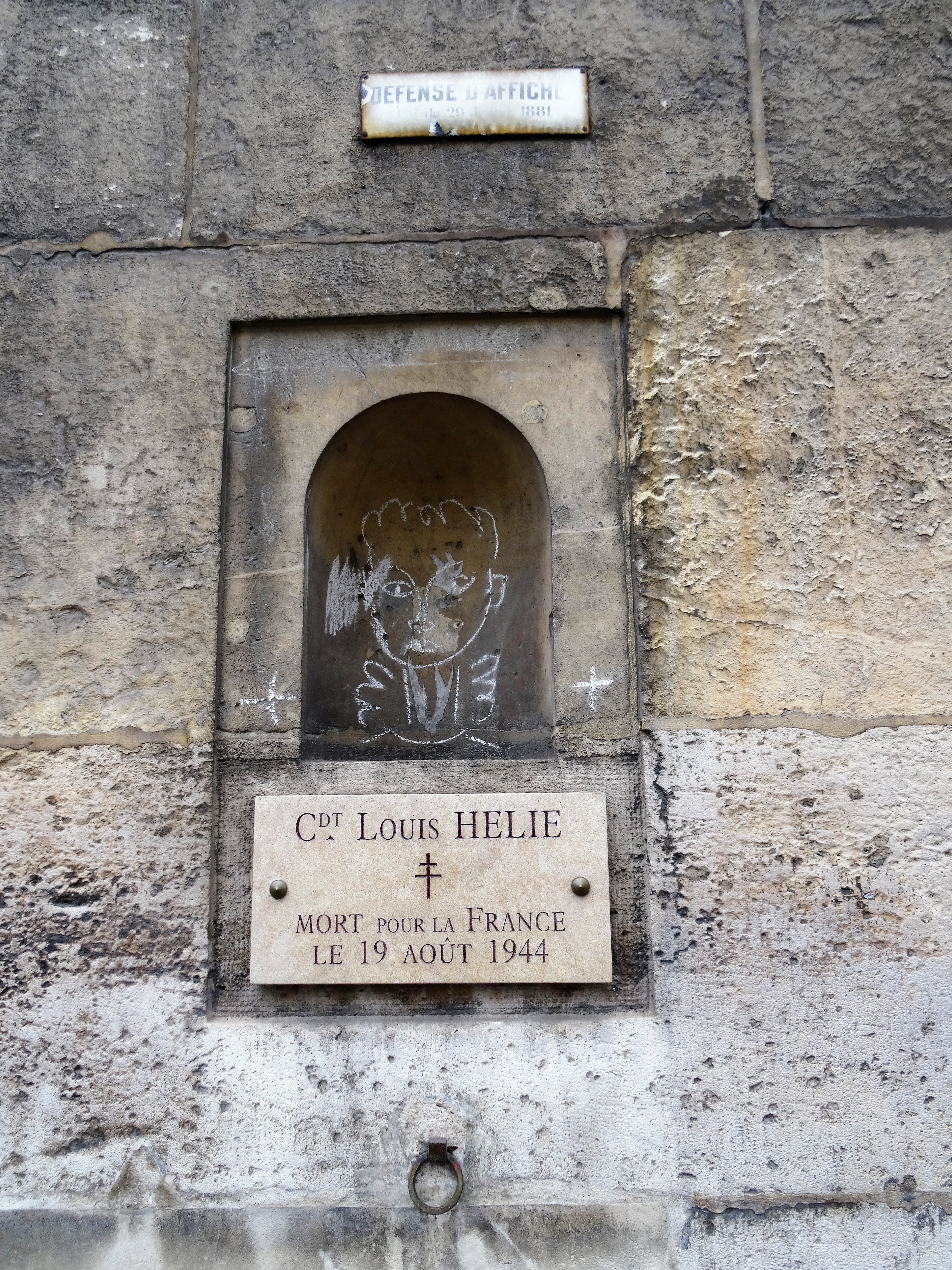 Paris 6ème - dessin à la craie de JC DE CASTELBAJAC rue de la Seine